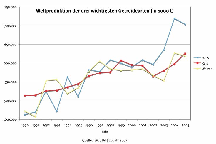 Produktion von Mais, Reis, Weizen weltweit von 1990–2005